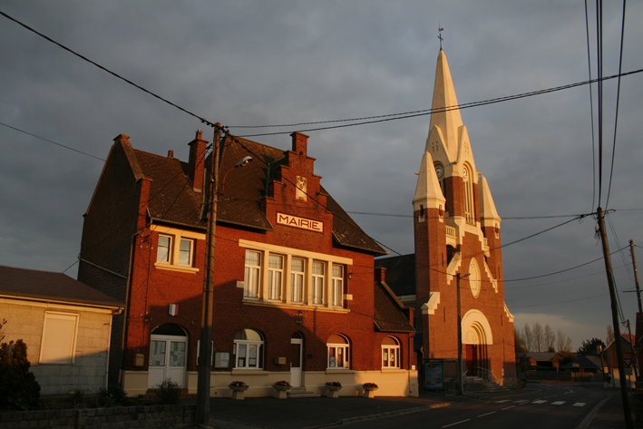 Eglise